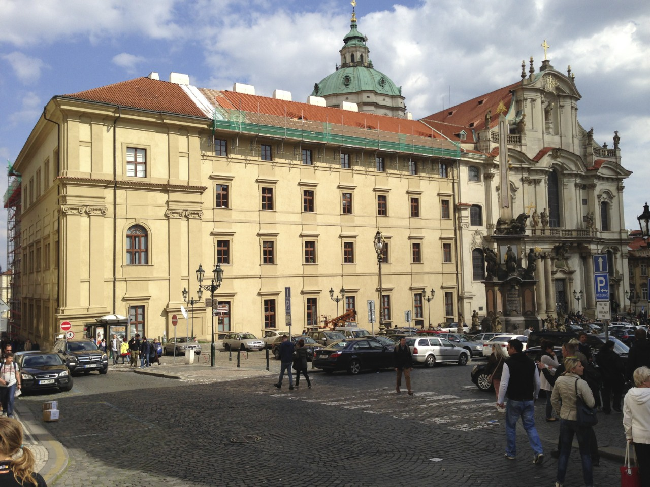 Profesní dům jezuitů na Malostranském náměstí. Pohled na západní fasádu, vlevo odlišně členění průčelí bývalého kostela sv. Václava.